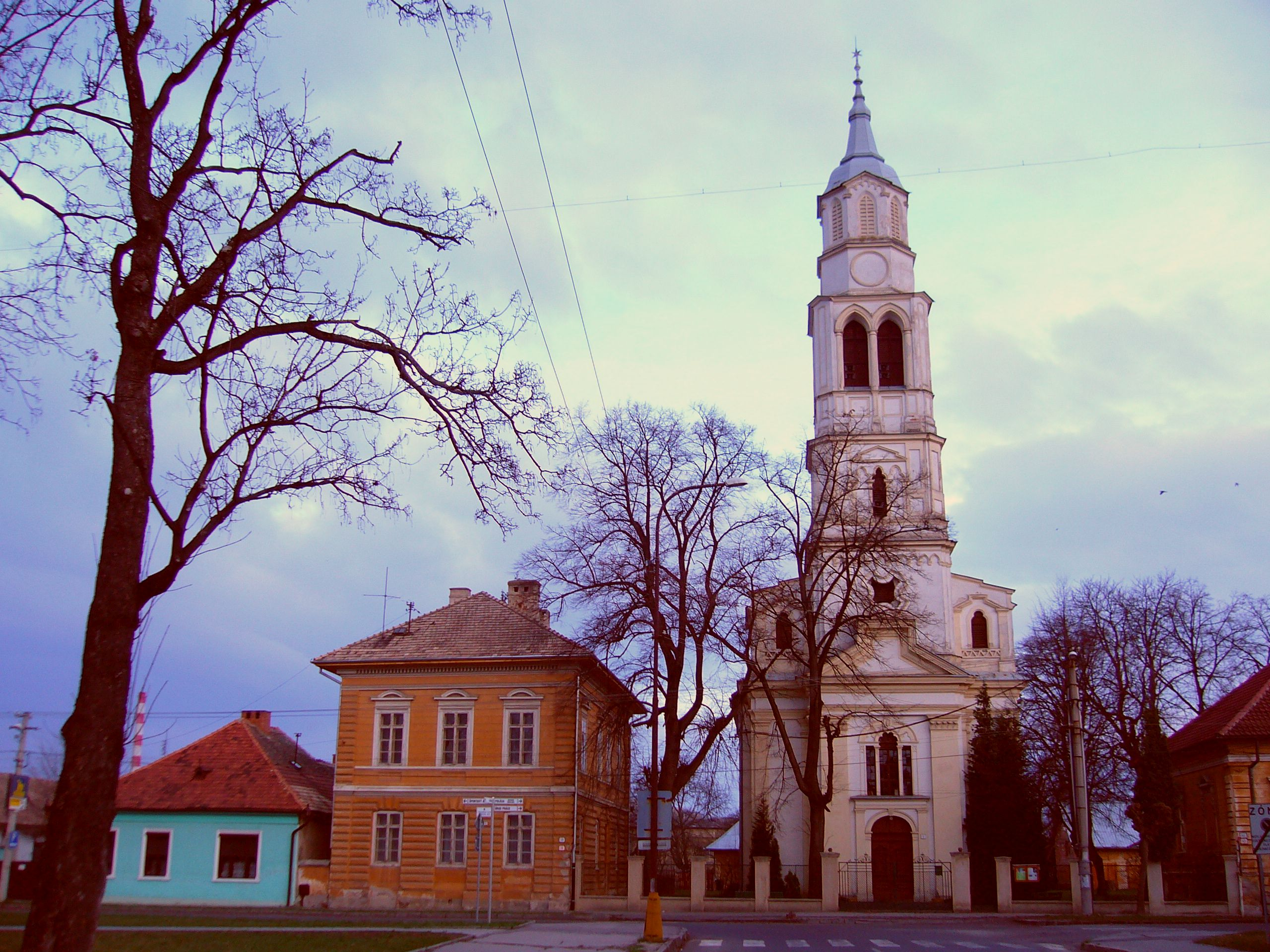 Rimaszombat, evangélikus templom